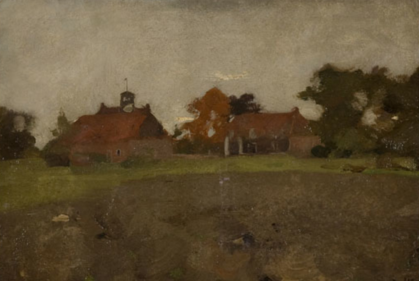 Landschap bij Diepenheim (Warmelo) - Willem Witsen 1886-1887 W268